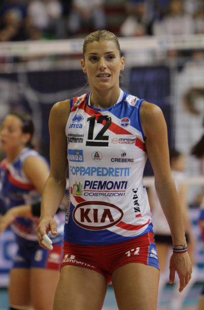 Francesca Piccinini, pallavolista italiana, gioca nel ruolo di schiacciatrice; qui con la divisa della Foppapedretti Bergamo.